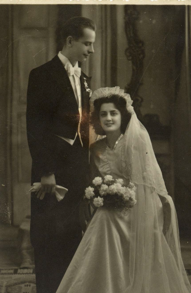 Imagine de Victor Sahleanu cu soția sa Zoe în 1948